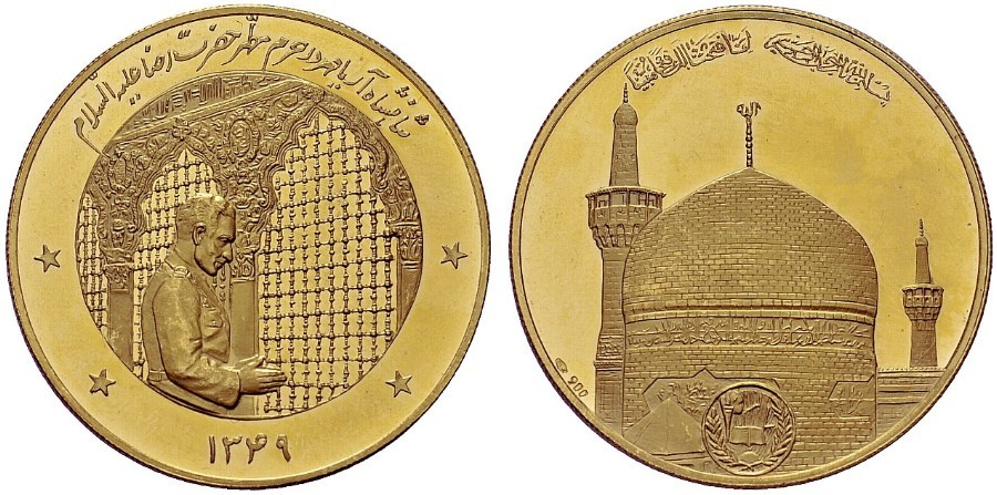 یادبود حضور محمدرضا پهلوی در حرم حضرت رضا علیه السلام